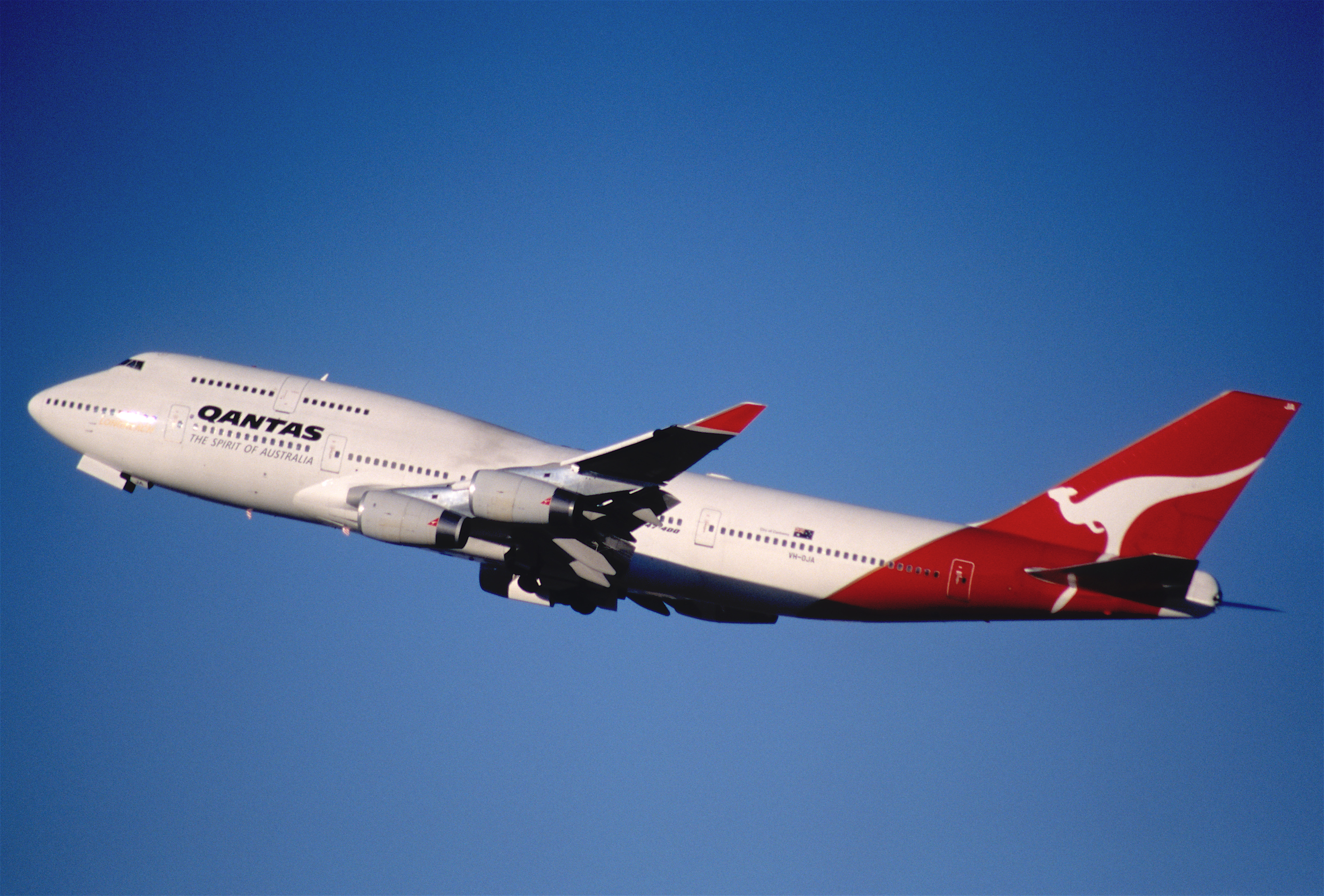 68ah - Qantas Boeing 747-438; VH-OJA@SYD;25.08.1999